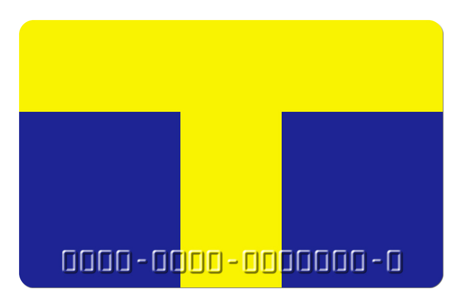 Tポイント（カルチュア・コンビニエンス・クラブが展開するポイントサービス）のカード